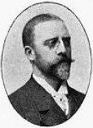 Lars Magnus Möller, läkare